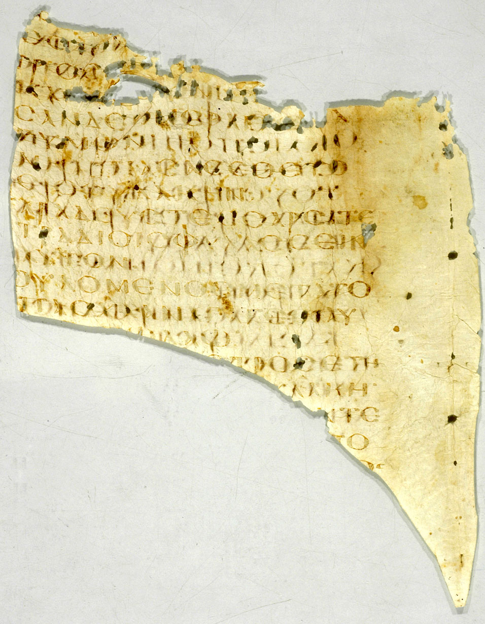 side verso with the text of Acts 12:3–5